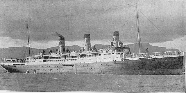 Photo du Gallia